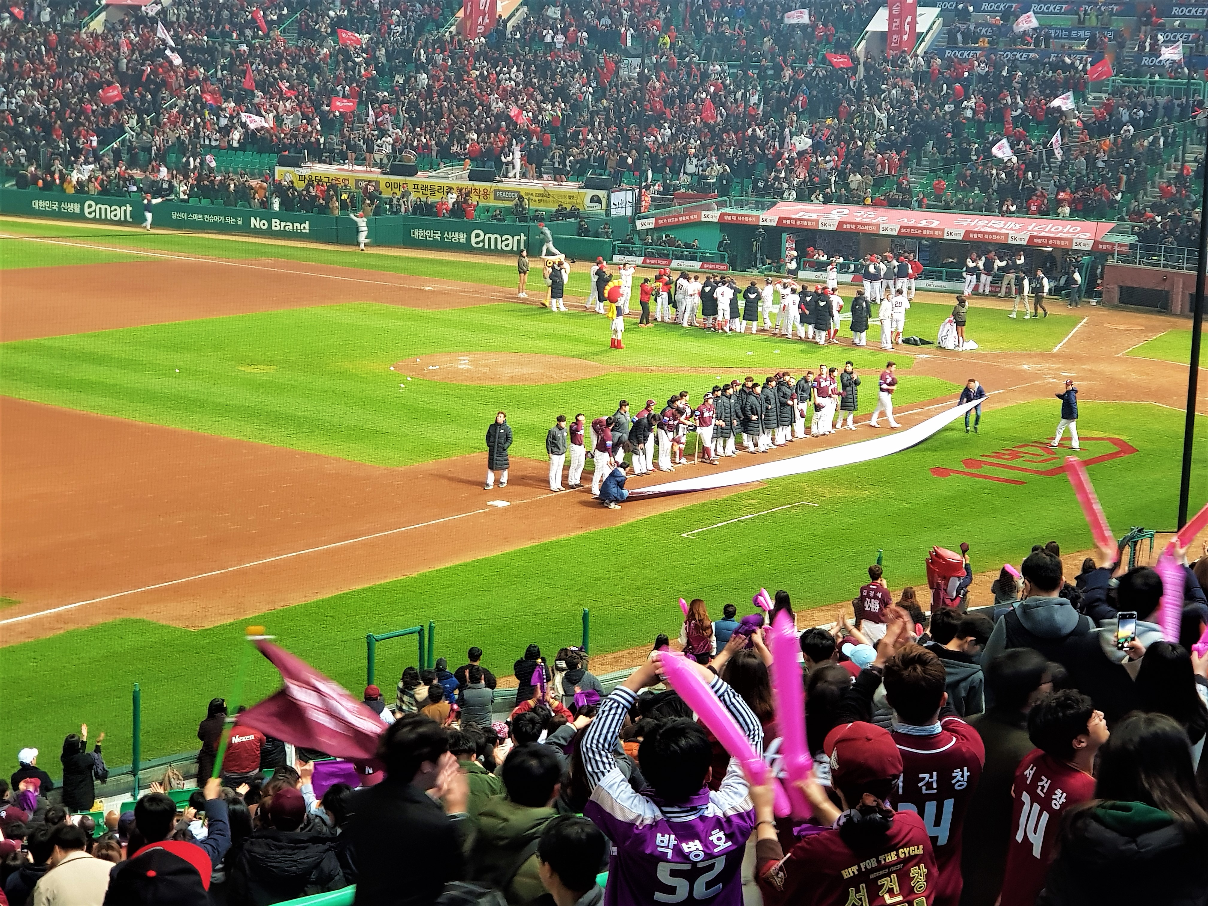 2018 KBO 포스트시즌 플레이오프 5차전